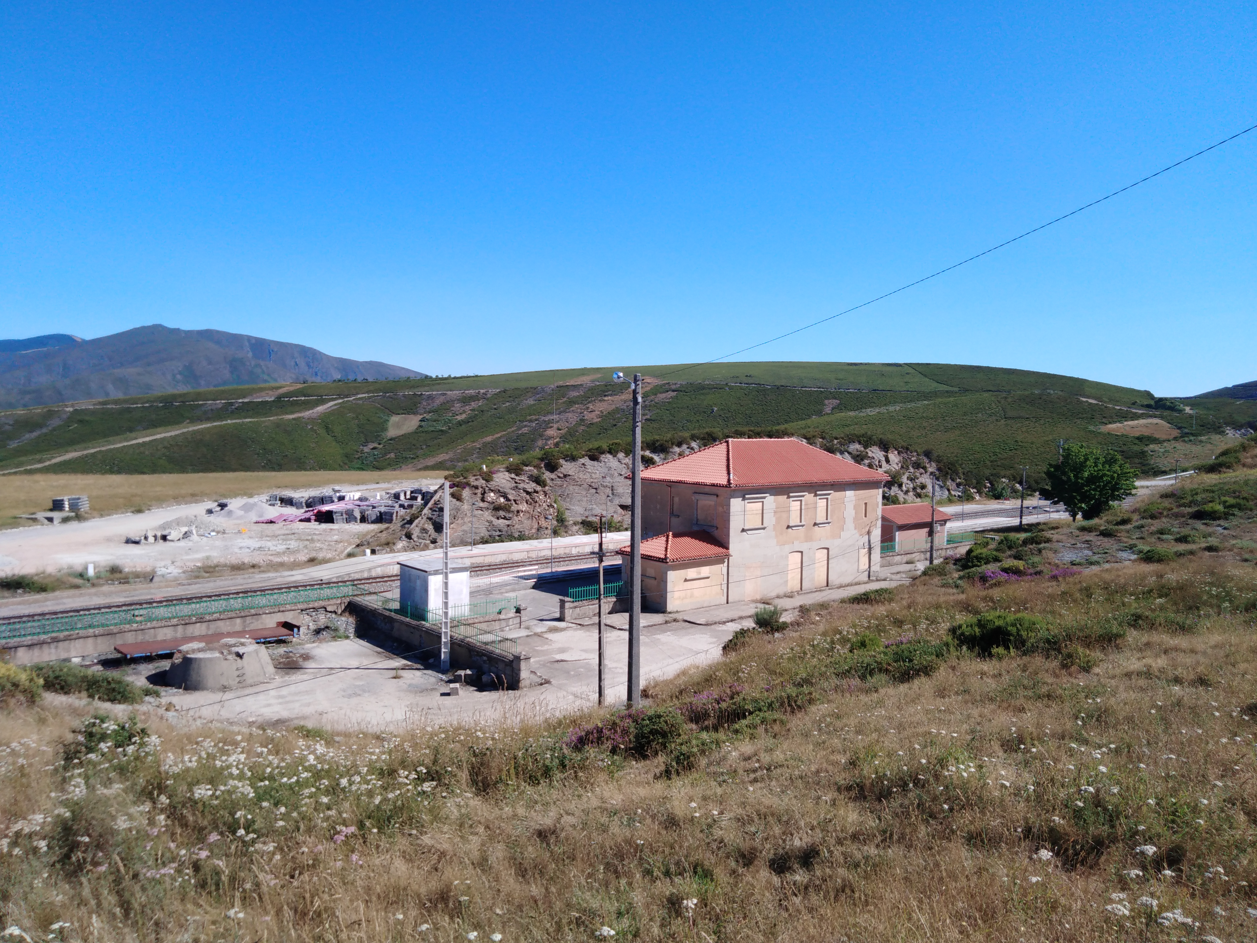 Estación de ferrocarril de Vilariño de Conso-A Capela